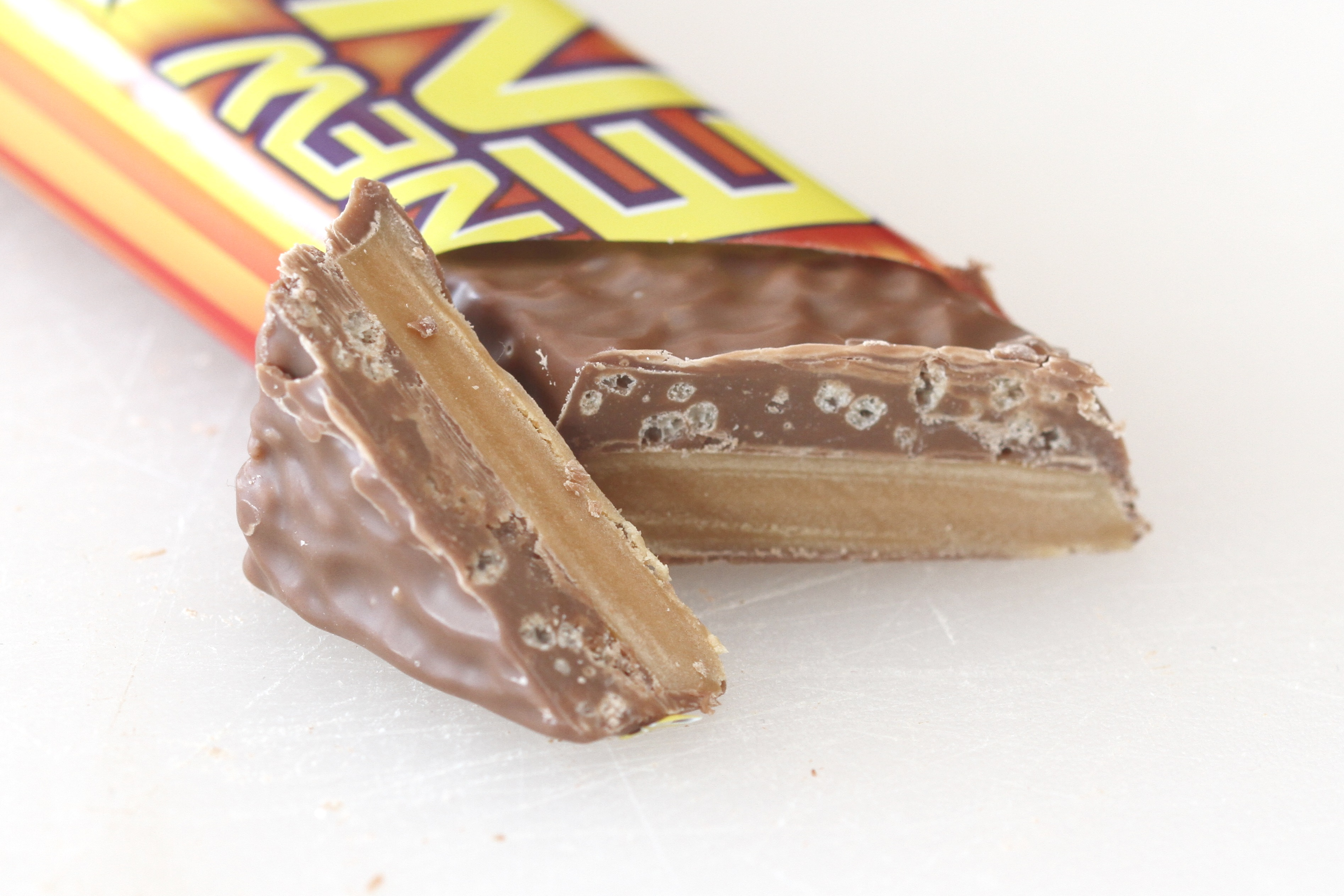 Sjokoladen New Energy.